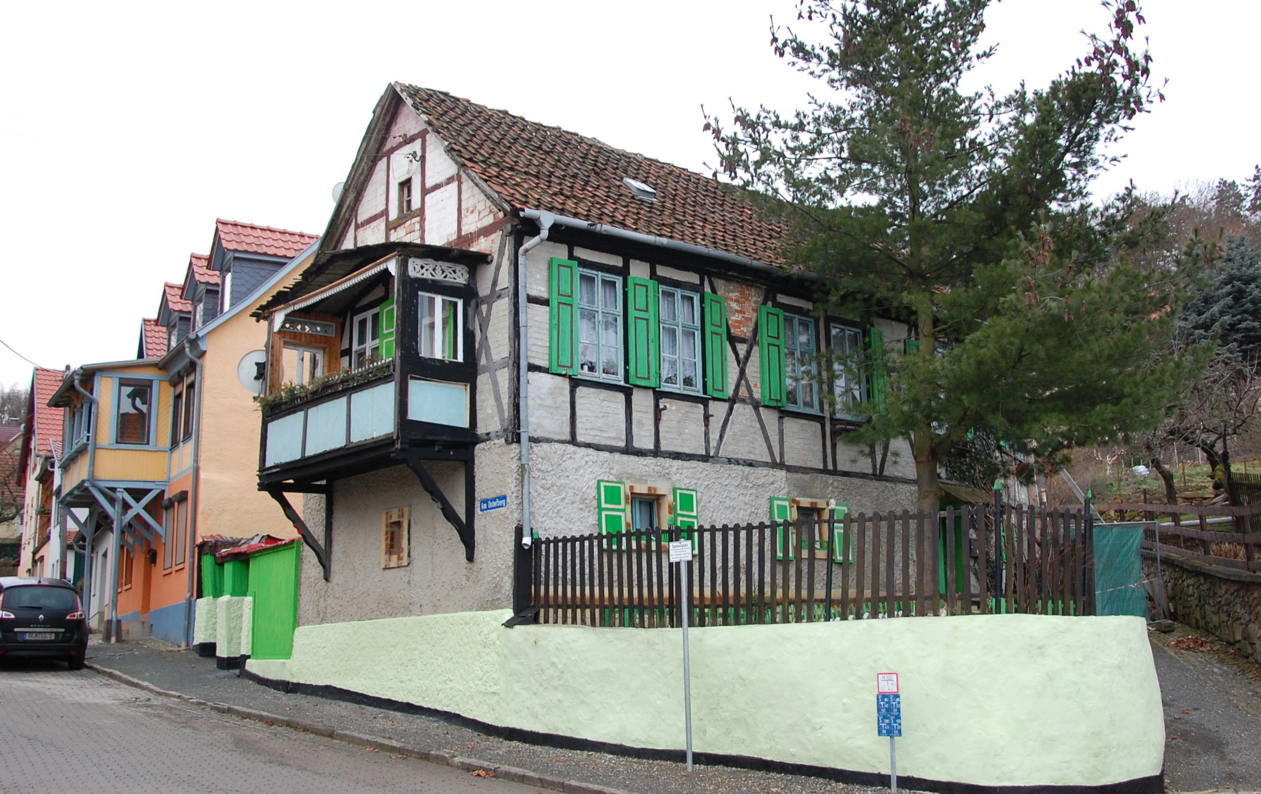 Häuser Am Osterberg in Gernrode